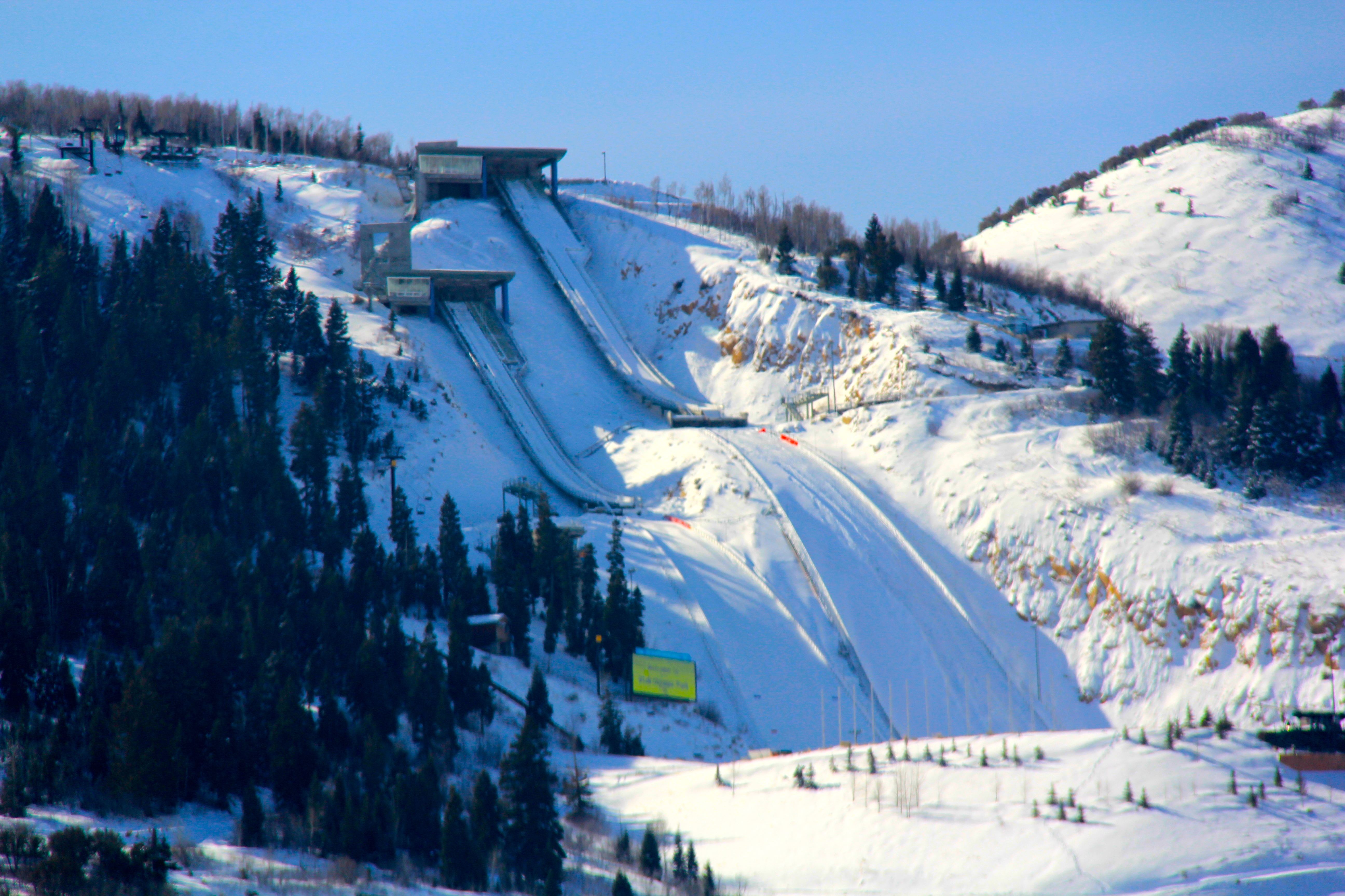 Utah Olympic Park Jumps